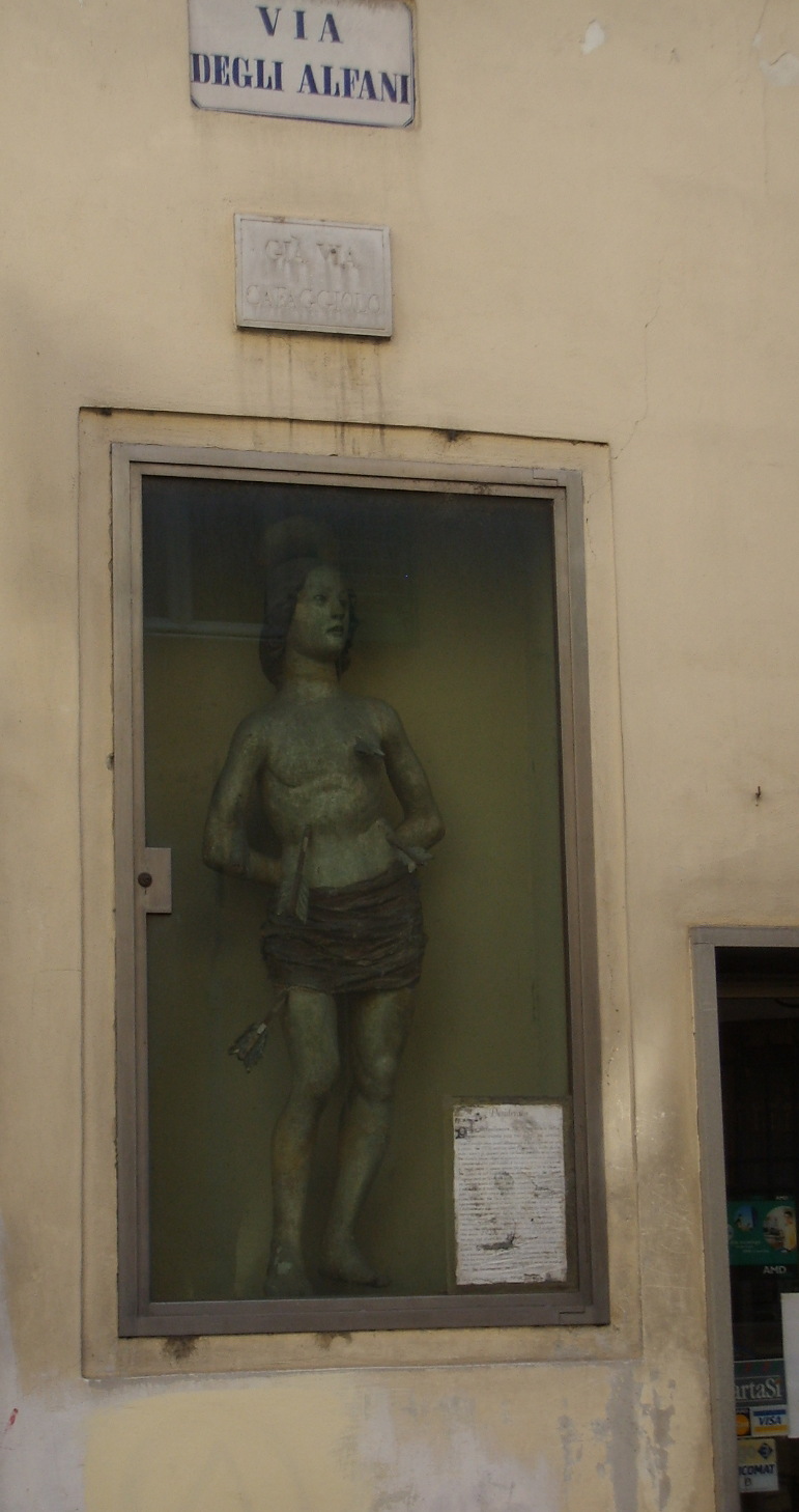 Tabernacolo_di_San_sebastiano,_via_alfani in Florence